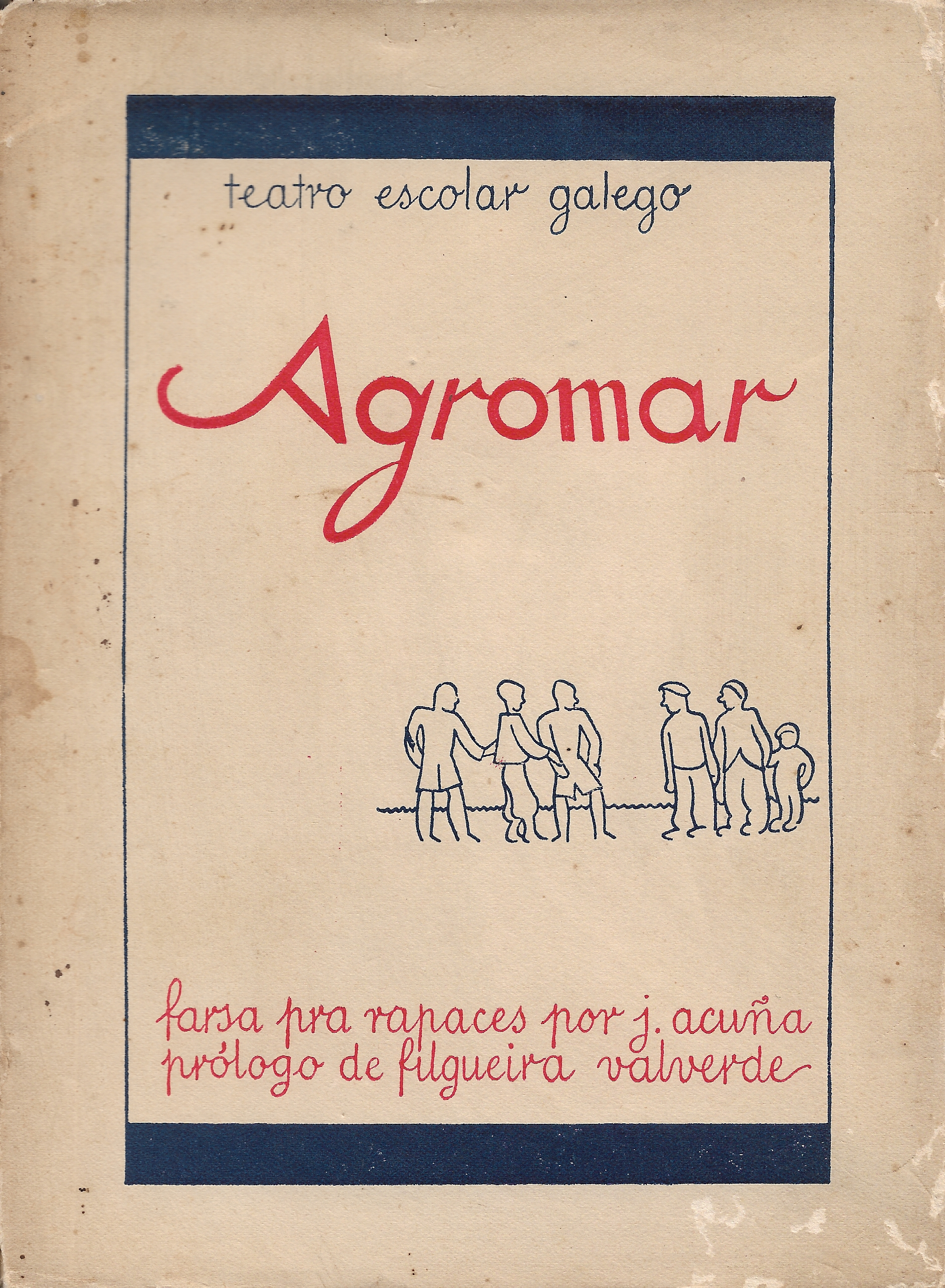 Portada da primeira edición da obra de teatro 'Agromar' de Xosé Filgueira Valverde (1936)